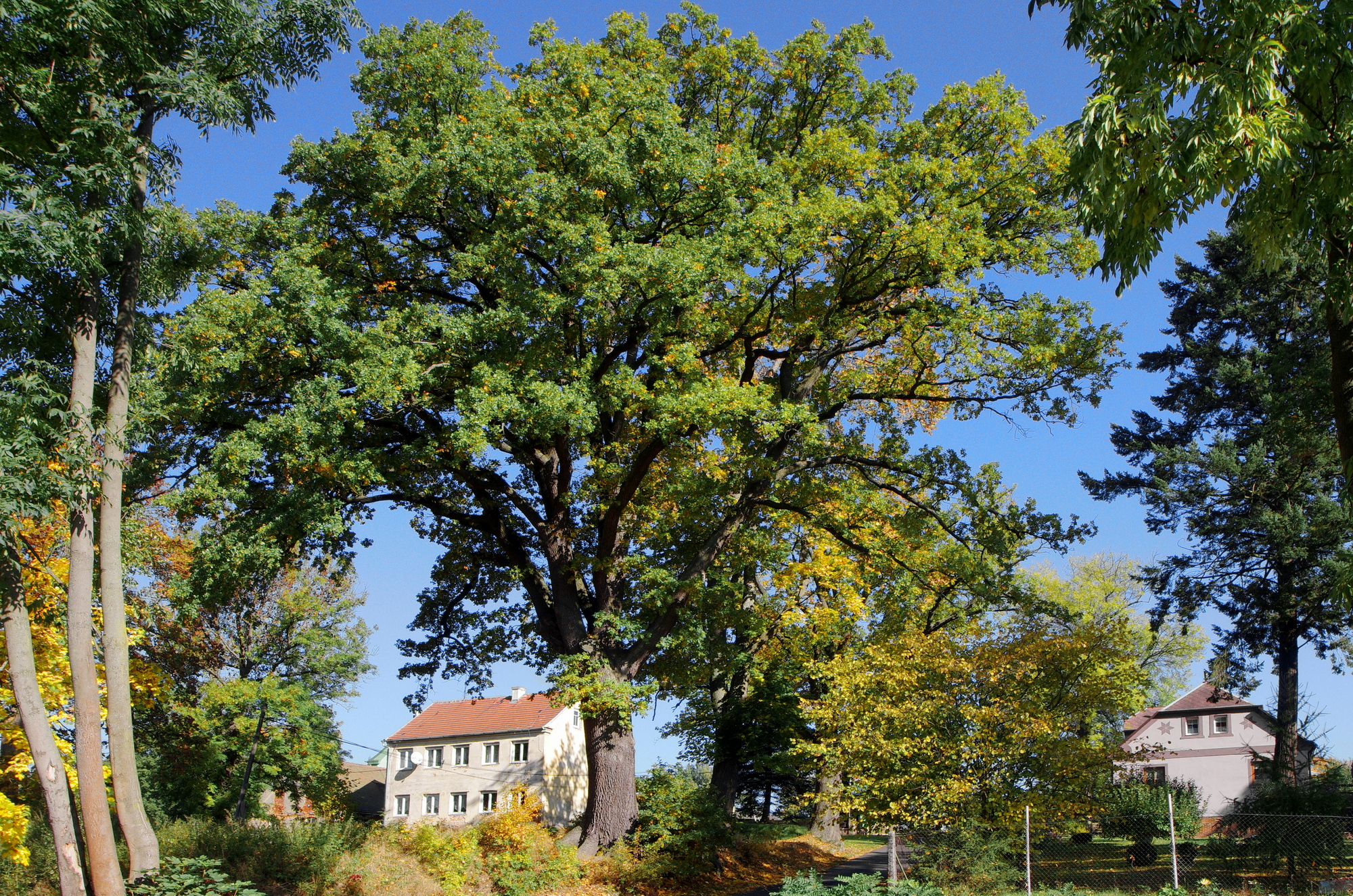 Památné stromy - Duby a javor nad zámkem, Hrozňatov, okres Cheb